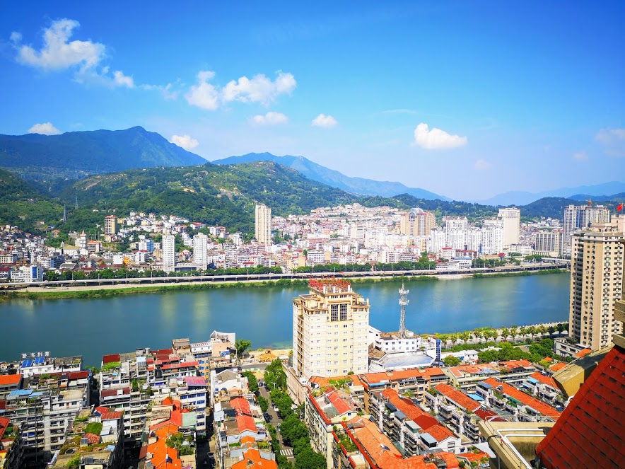 Photo de Qingtian prise du haut d'un gratte-ciel